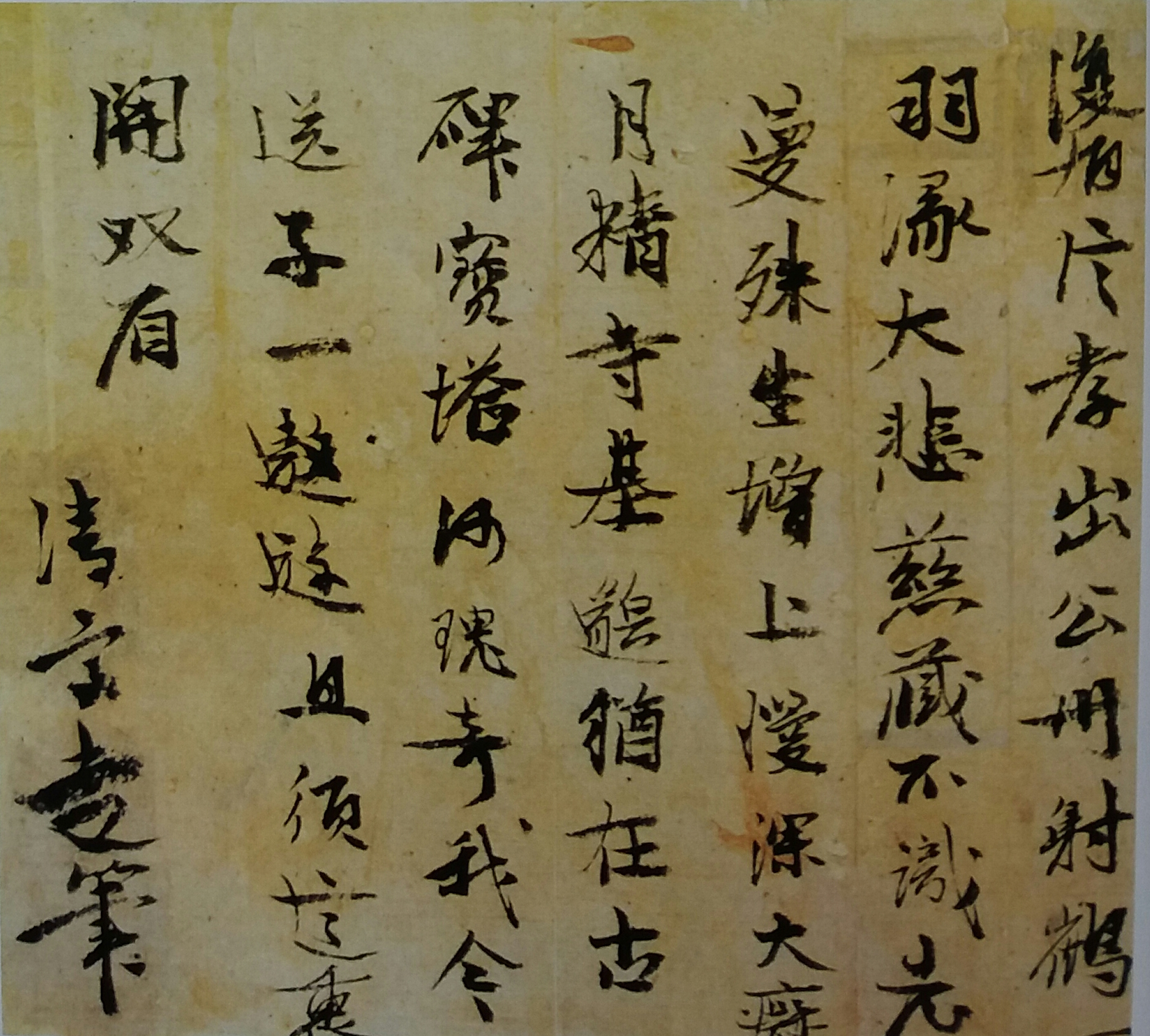 金时习《诗稿》（15世纪），23X21.80CM，成均馆大学博物馆藏